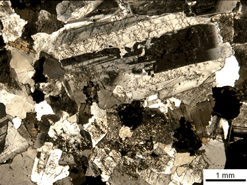 Granito. nicol incrociati